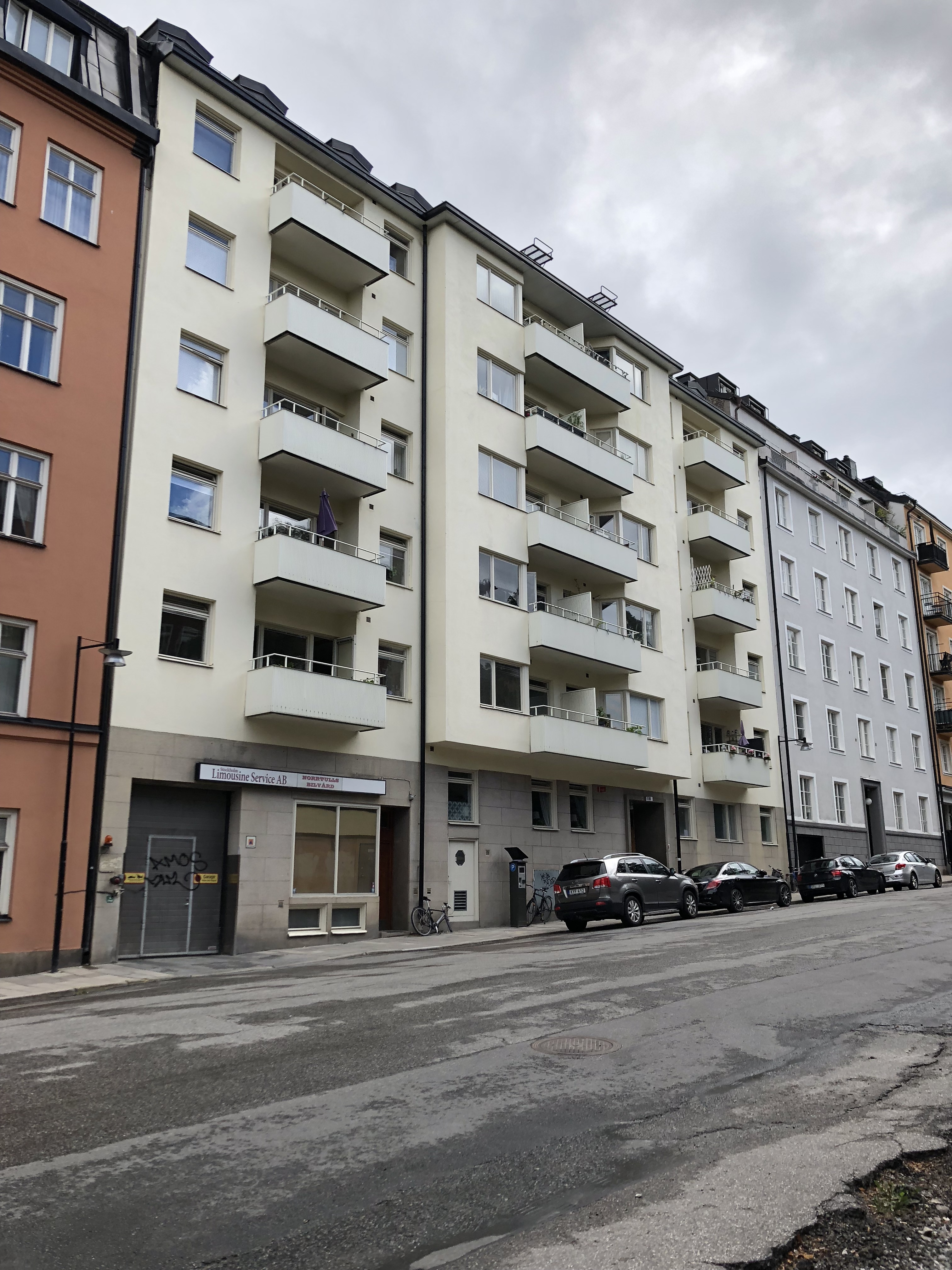 Danemoragatan 18 i Stockholm, fastigheten Sländan 5.